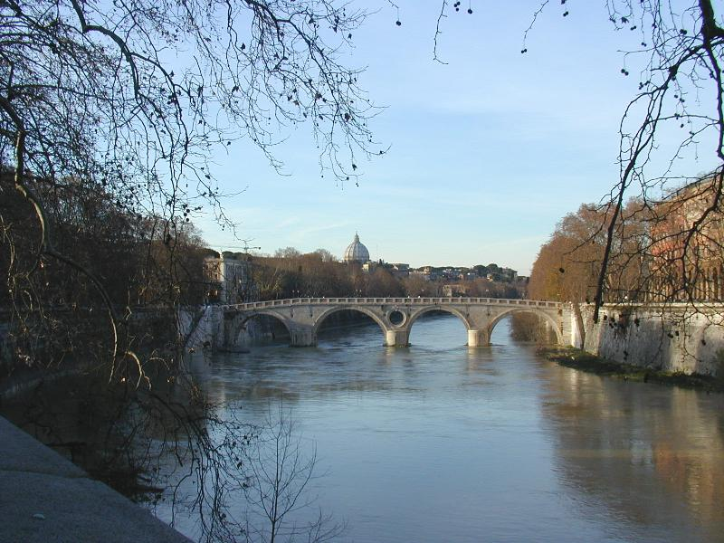 Roma, ponte Sisto